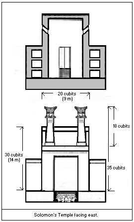 Solomons temple front